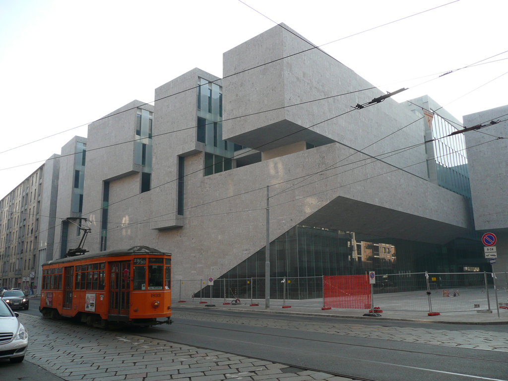 La nuova sede dell'Università Luigi Bocconi a Milano è stata rivestita interamente con il Ceppo di Gré. Progetto premiato al Festival Mondiale dell'Architettura 2008 a Barcellona